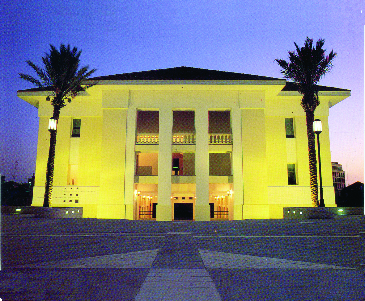 Suzanne Dellal Centre